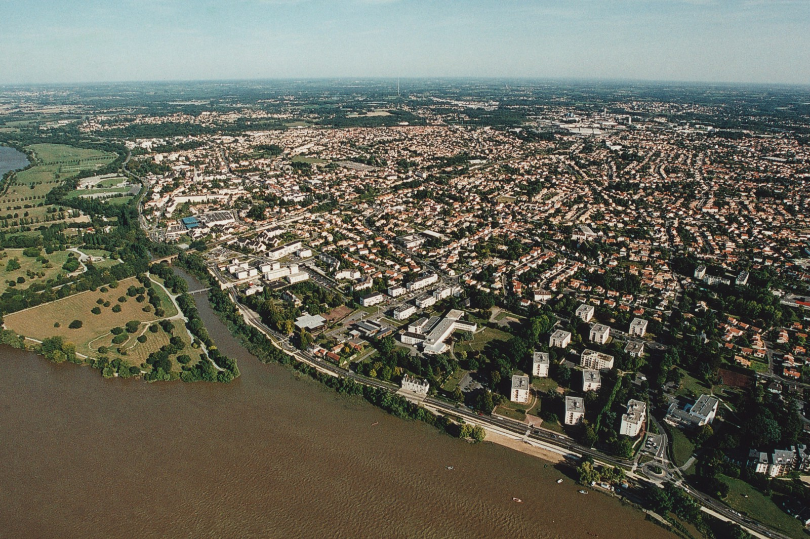 Vue aérienne de Saint-Sébastien-sur-Loire avec les îles Forget et Pinette sur la Loire